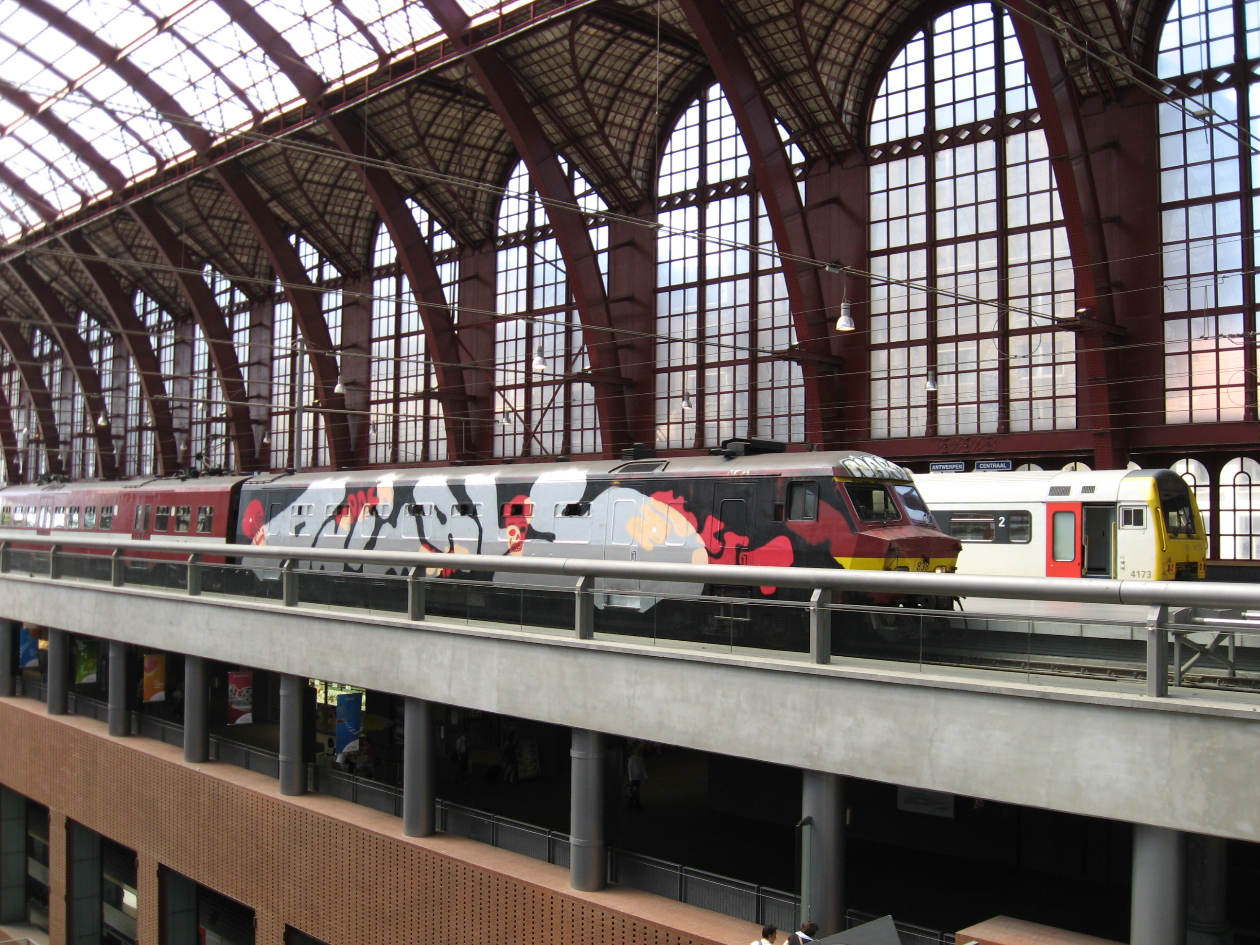 Volgekalkte trein in Antwerpen Centraal